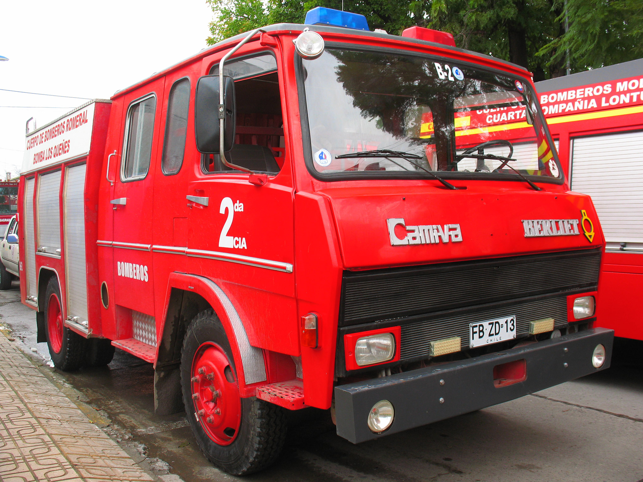 Berliet 770 KB Camiva 1978